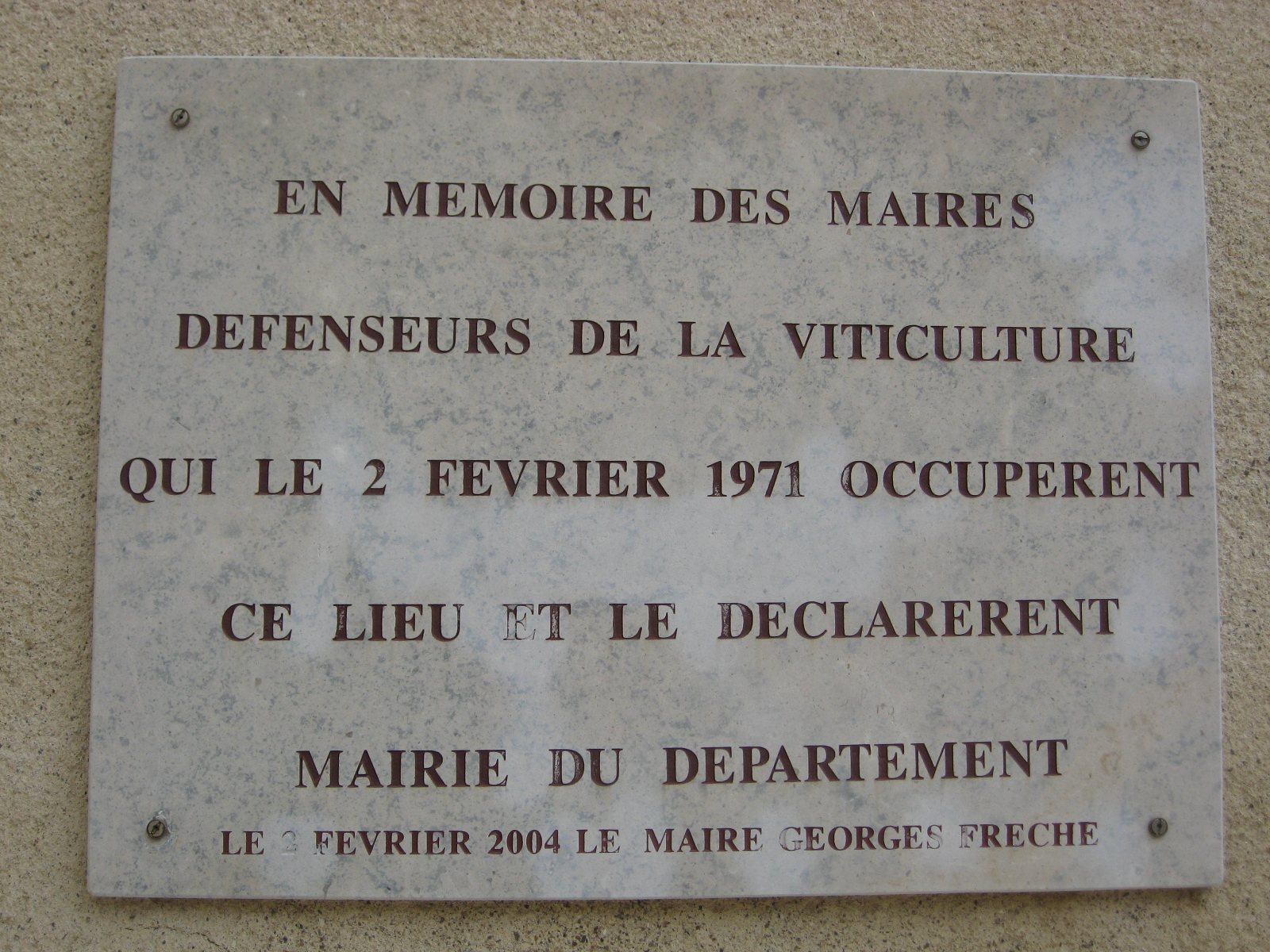 Plaque apposée le 2 février 2004 par Georges Frêche (maire de Montpellier) sur la façade du Pavillon populaire (Montpellier).